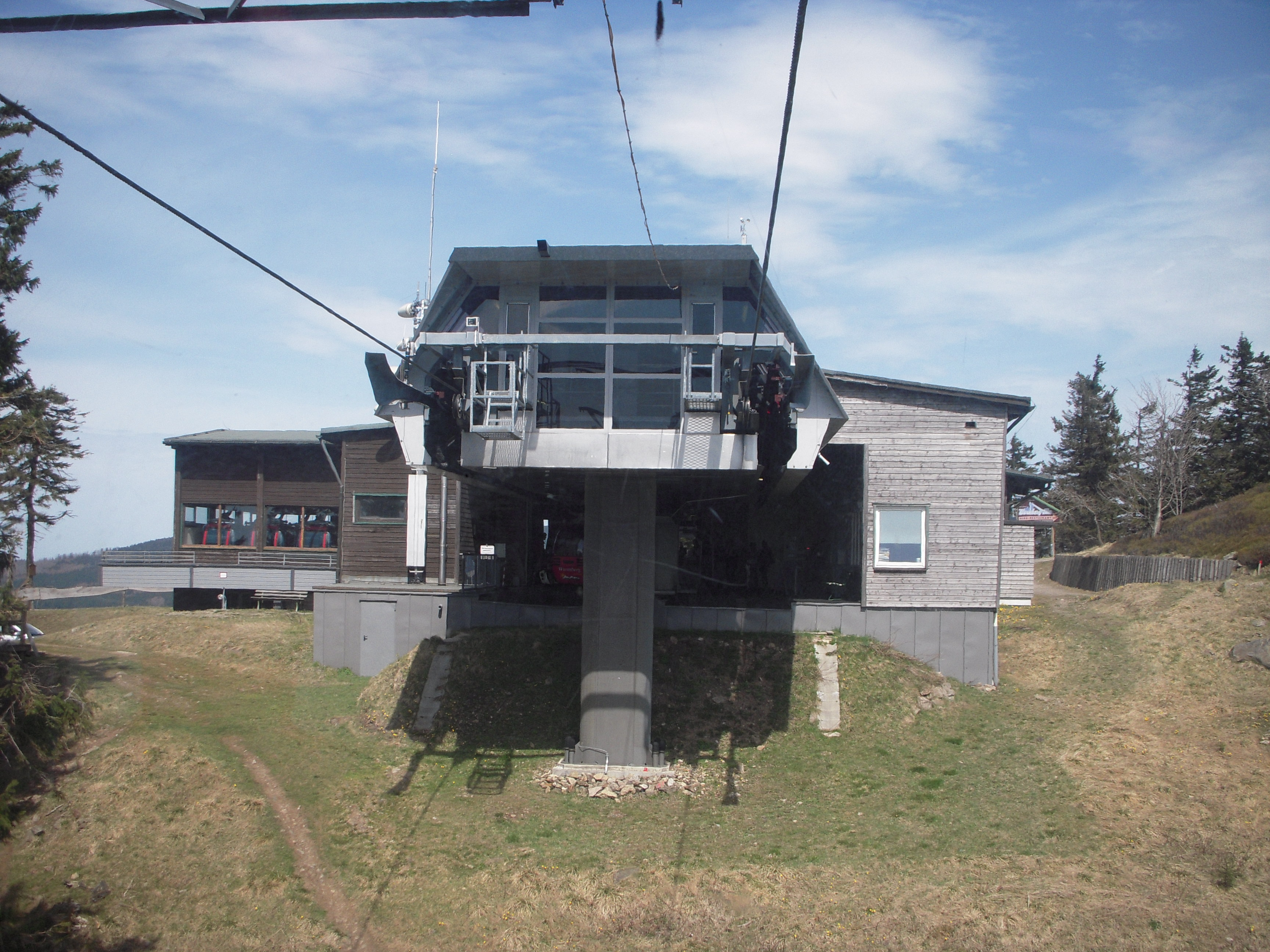 Topstation, Wurmbergseilbahn, april 2012